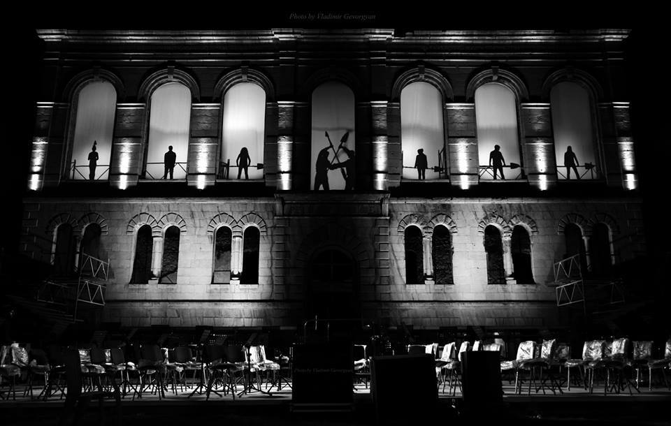 Ռեալական դպրոց